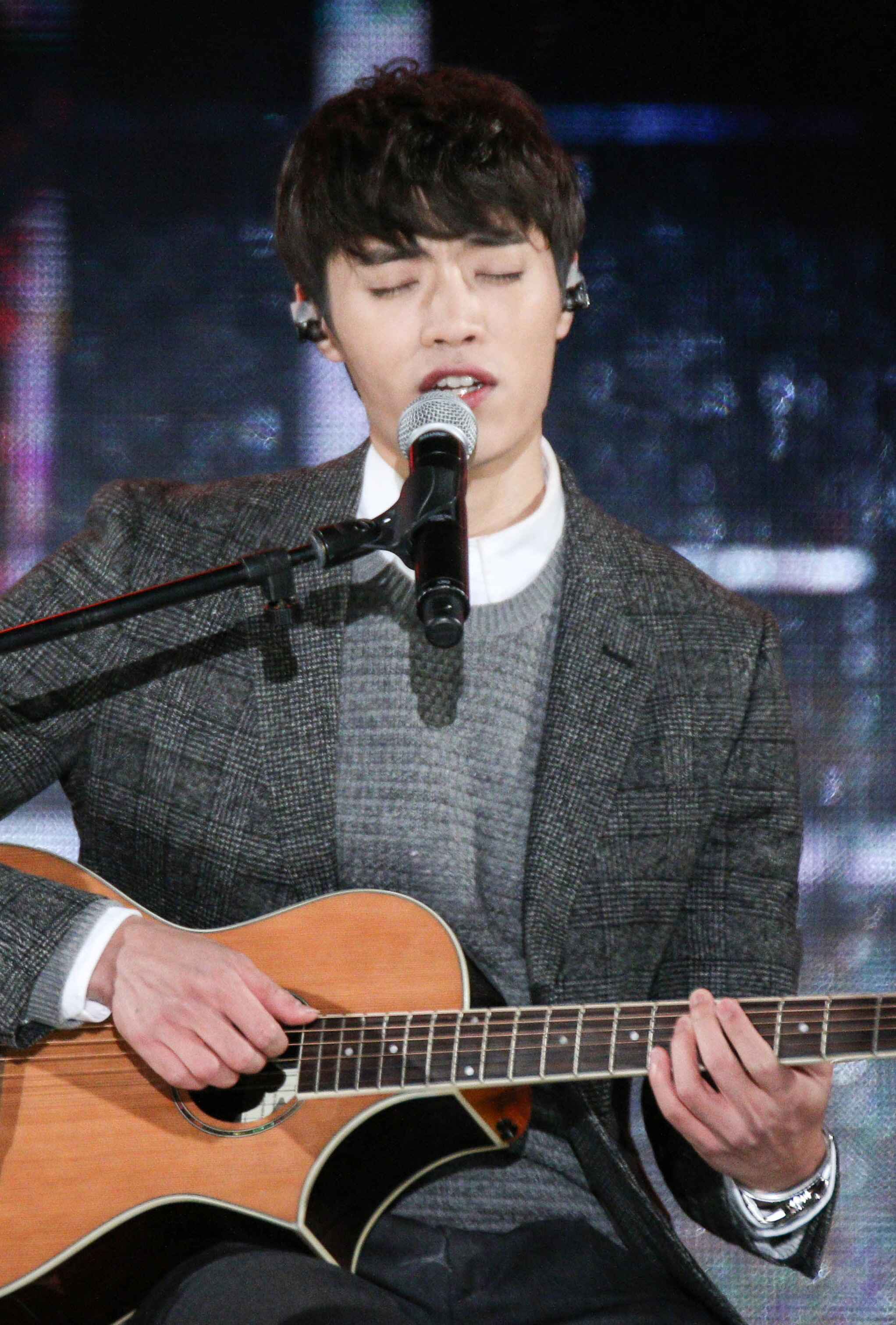 141211 김예림&에디킴 더쇼 in 코엑스 야외무대